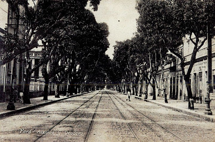 Avenida Generalíssimo Deodoro e seus sistemas de bondes elétricos, início do século XX